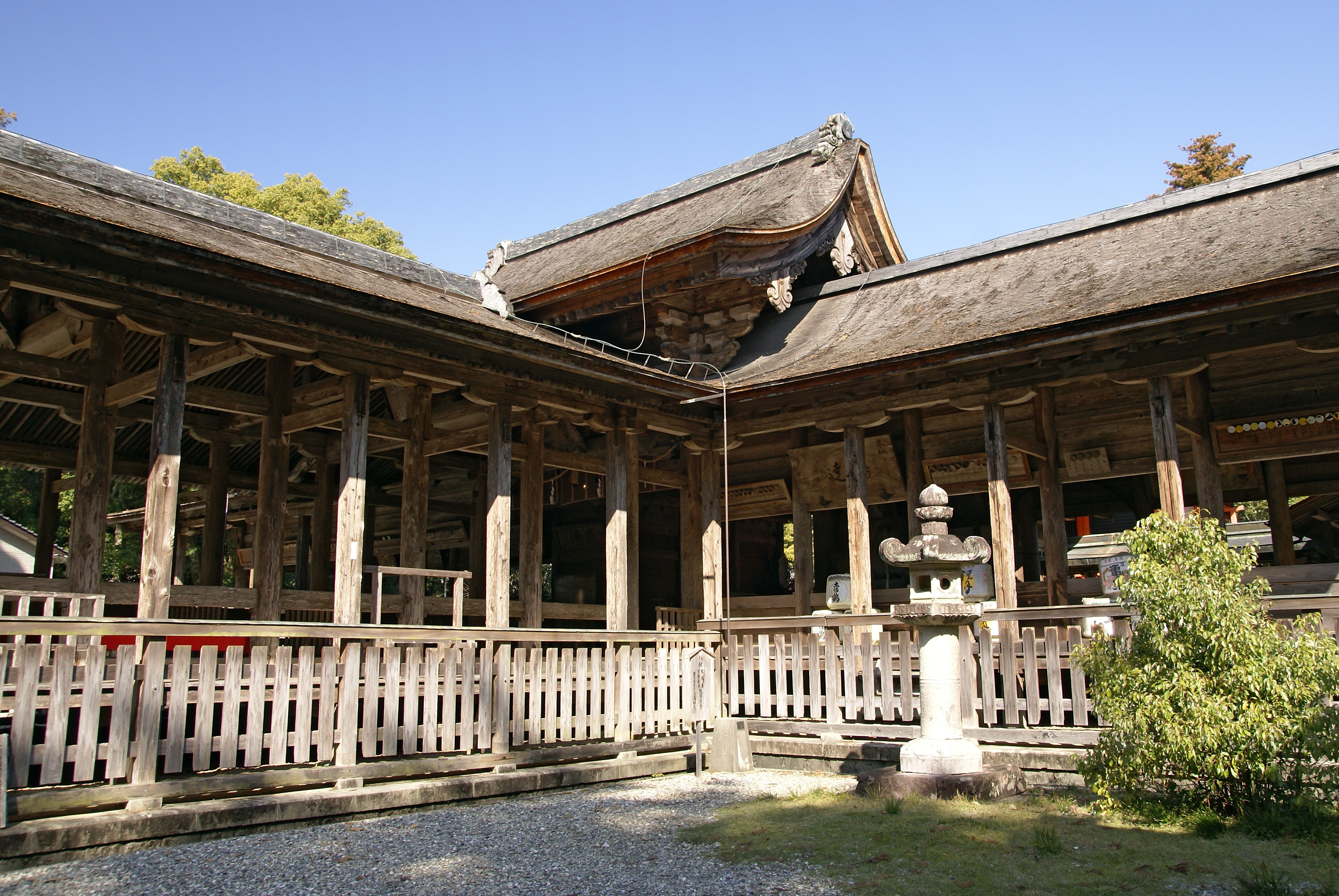 Tosa-jinja in Kochi, Kochi prefecture, Japan